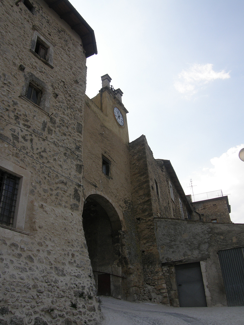 Vittorito